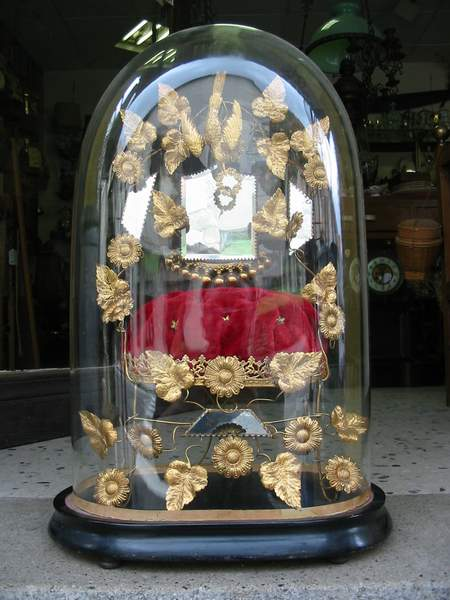 Globe de mariée (hauteur 50 cm)